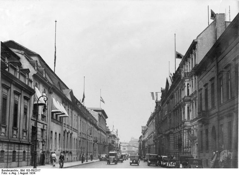 Berlin, Wilhelmstraße ADN-ZB/Archiv Berlin 1934; die Wilhelmstraße hat anläßlich des Todes von Reichspräsident Paul von Hindenburg am 2.8.1934 Halbmast geflaggt, l. die Reichskanzlei (Wilhelmstraße 77), daneben das Auswärtige Amt (Wilhelmstraße 76). 101-46